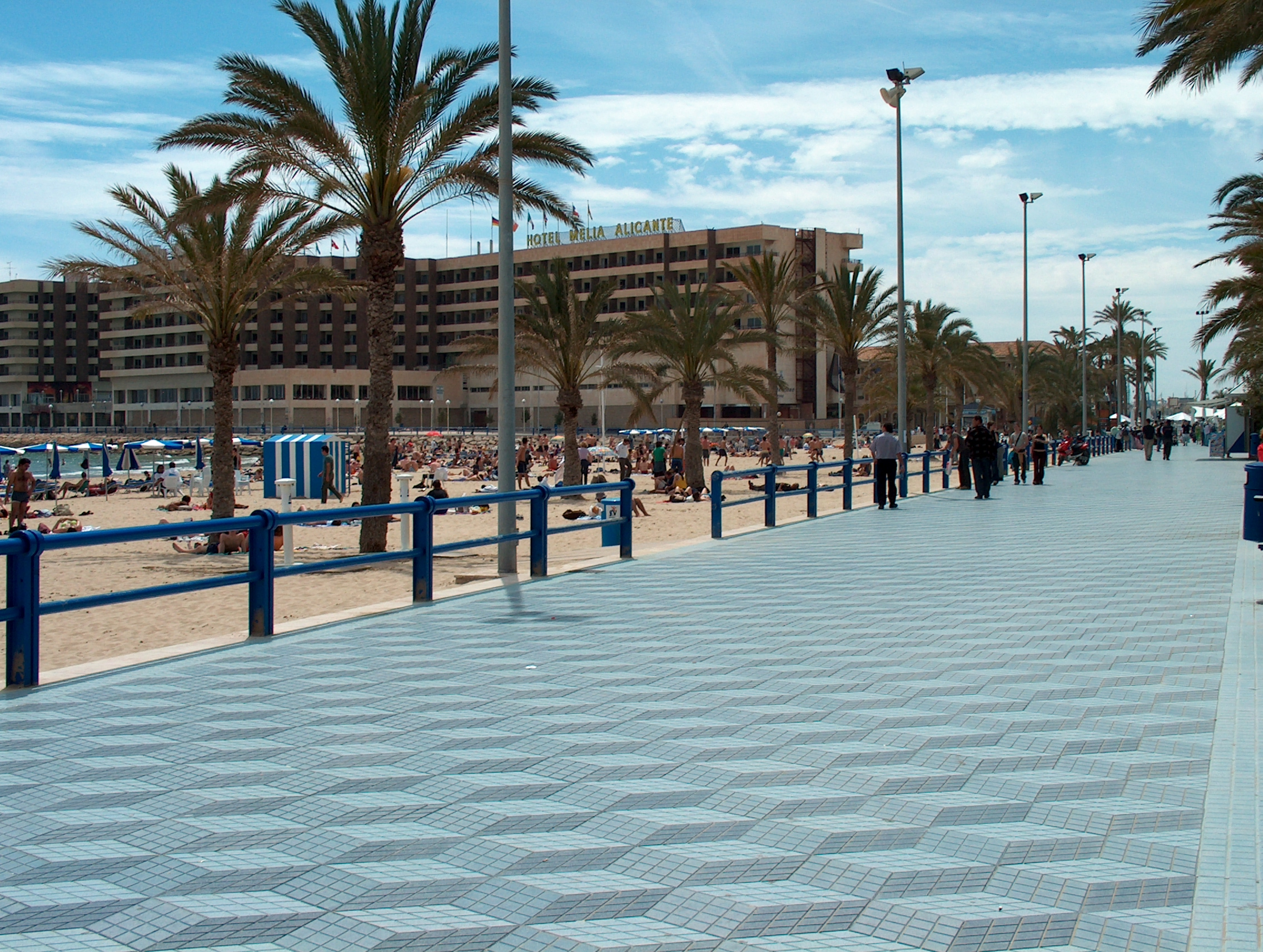 Die schöne Mittelmeer-Hafenstadt Alicante mit der Promenade Esplanada am Hafen.